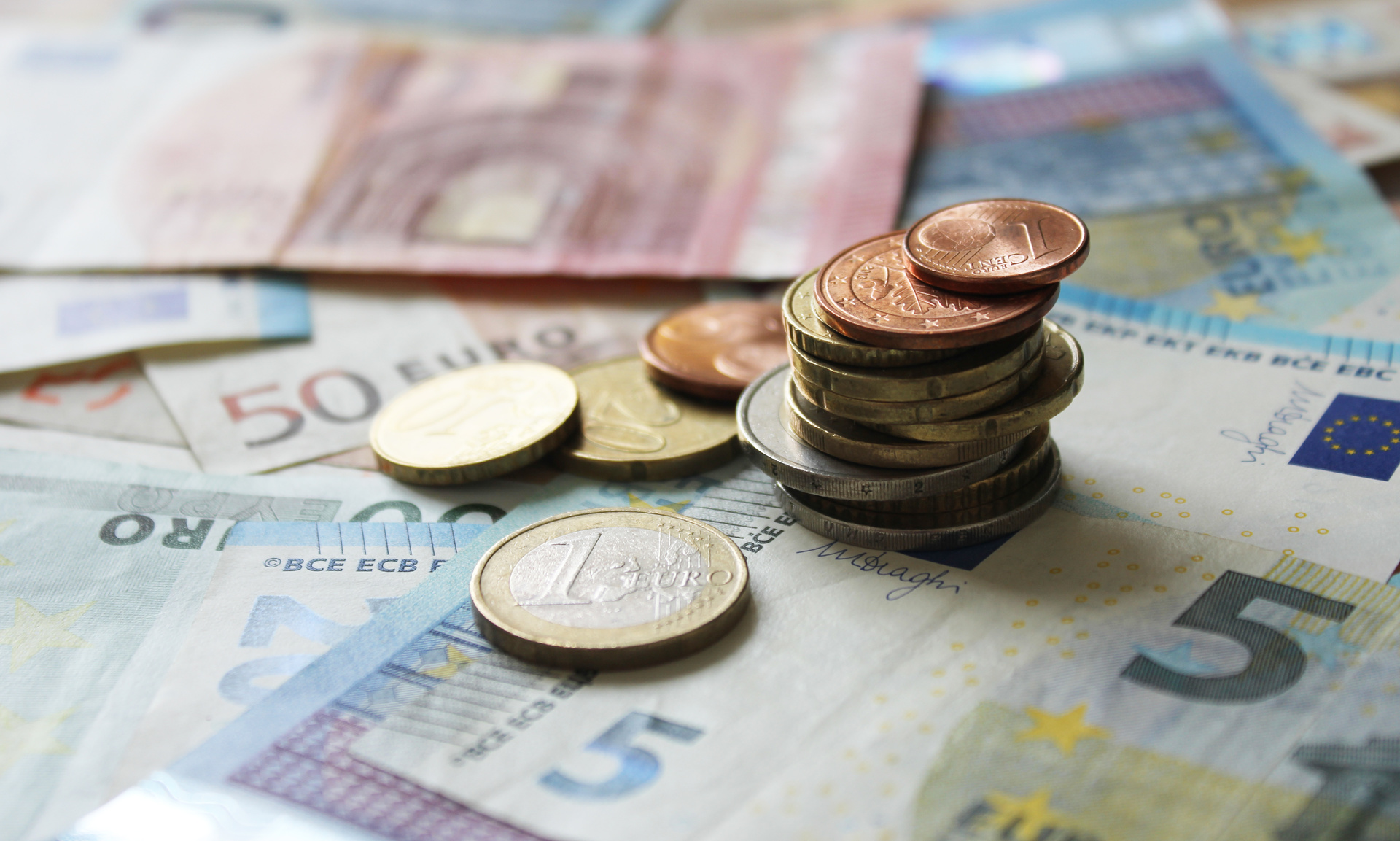 Euro-Geld auf Scheinen und Banknoten - 1 Euro Fokus mit Stapel